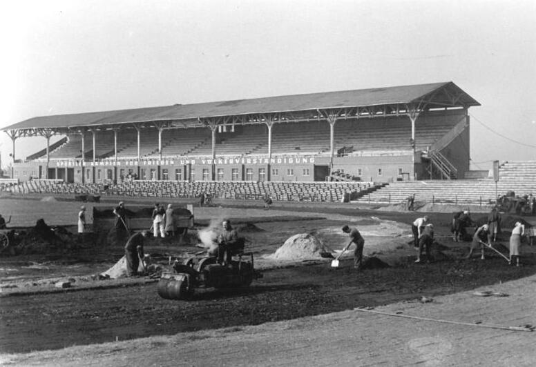 Zentralbild Quaschinsky 29.4.1952 Vorbereitungen in Leipzig zur V. Radfernfahrt für den Frieden Warschau-Berlin-Prag. UBz: Das Bruno-Plache-Stadion wird für die Friedensfahrer das Ziel in Leipzig sein.- Die letzten Arbeiten an der Aschenbahn.